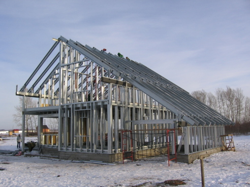 Каркас коттеджа из ЛСТК